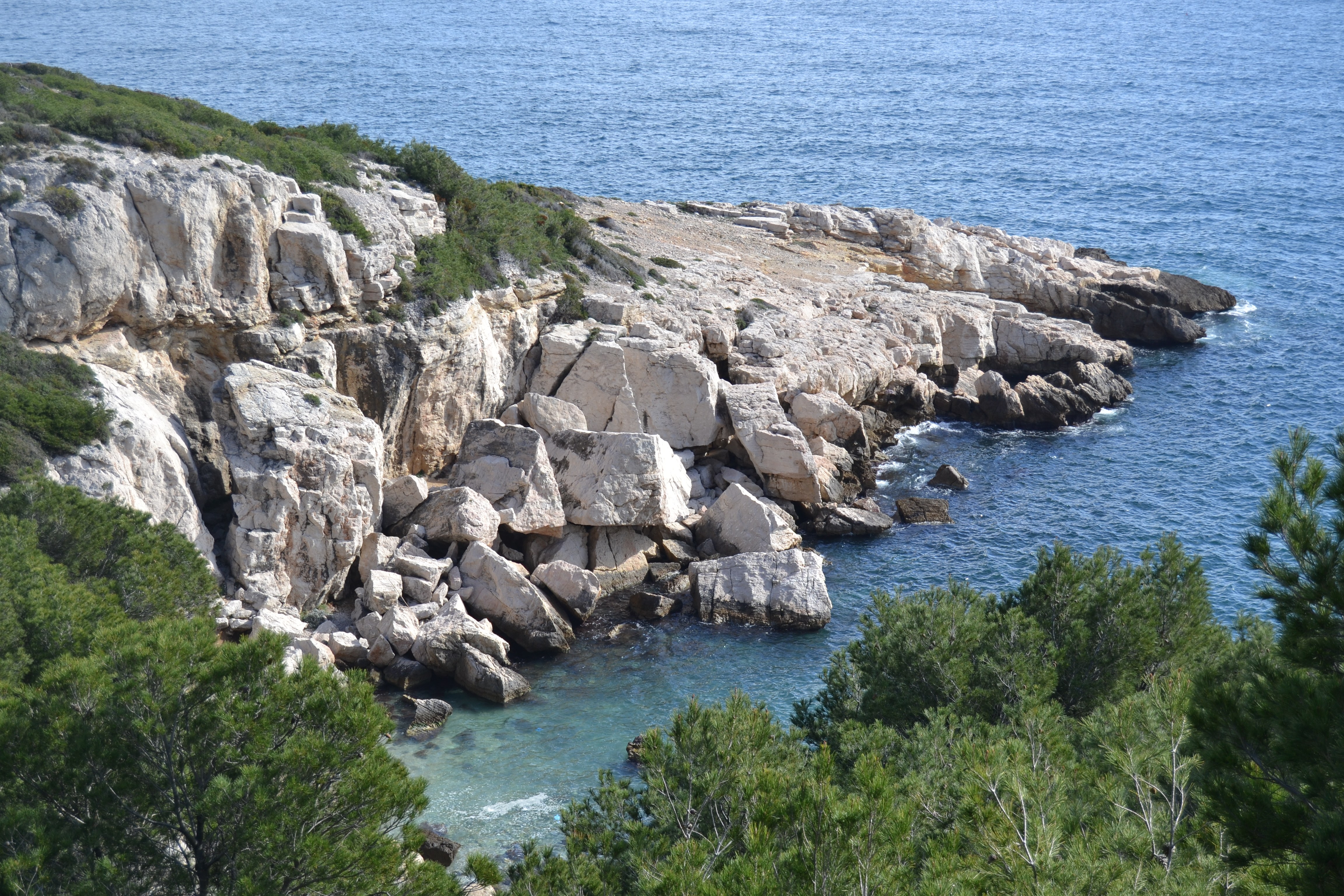 Calanca dei Cairons en 2013.